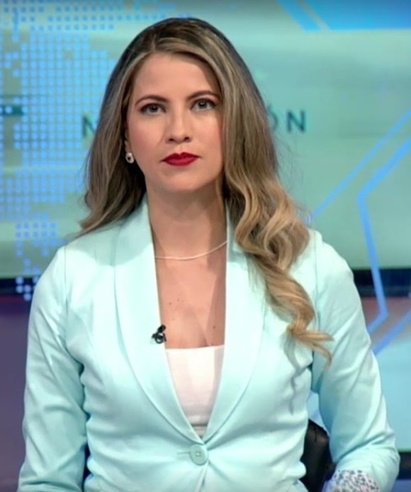 Presentadora de TV boliviana.